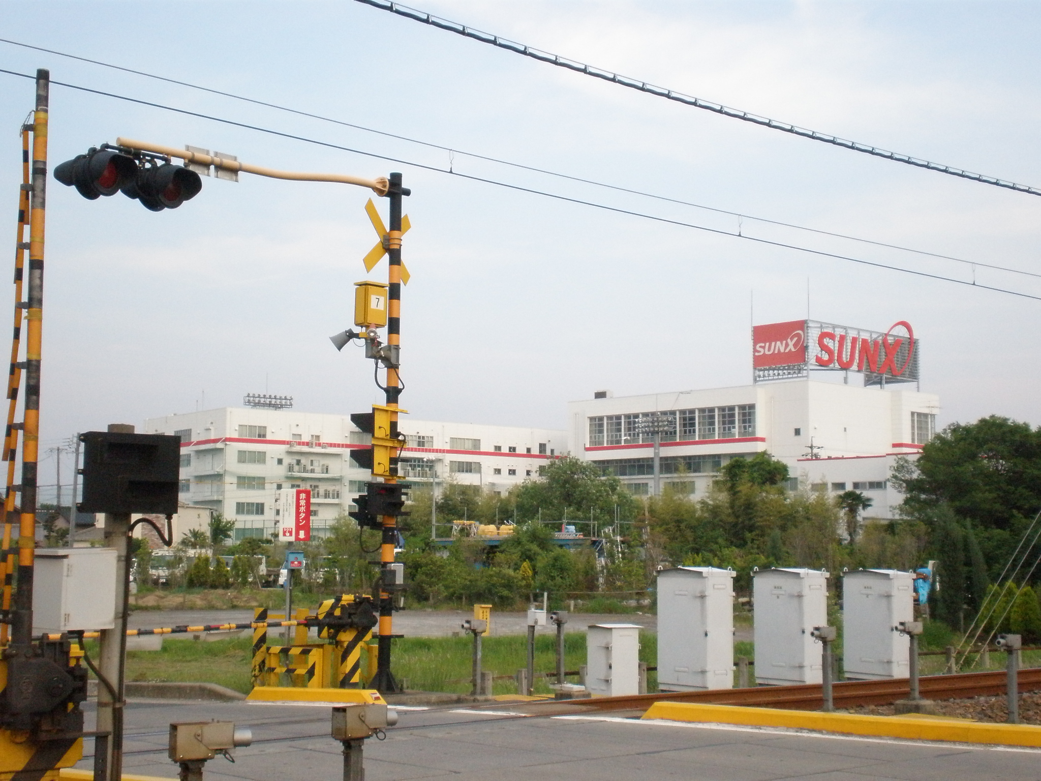 愛知県春日井市にあるSUNX（サンクス）本社（撮影場所：春日井市牛山町）